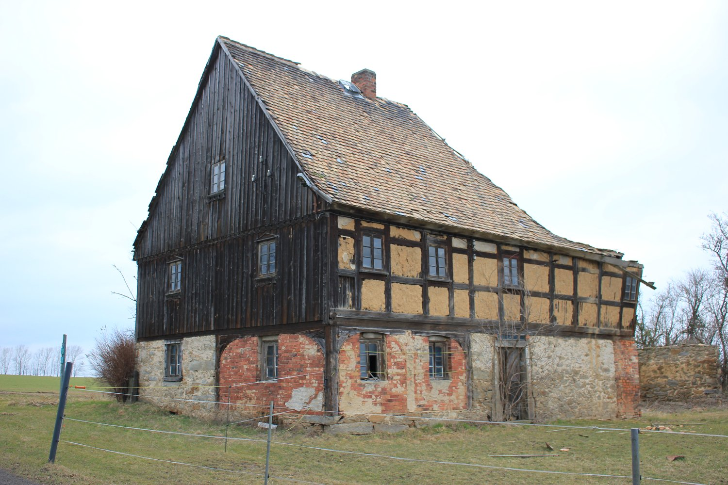 Hornjoserbsce: Domske w Čornecach (čo. 2b).